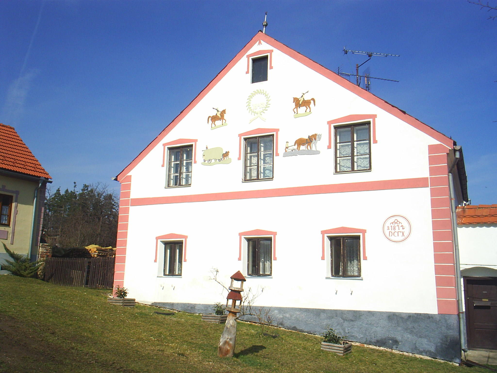 Holašovice-chráněná památka UNESCOEsperanto: Holašovice-protektata memorindaĵo de UNESCO